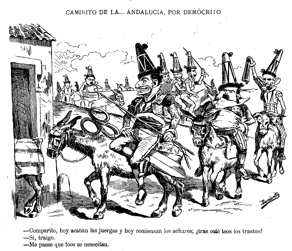 Caminito de la Andalucía, de Eduardo Sojo «Demócrito, publicada en la revista satírica española Gil Blas.